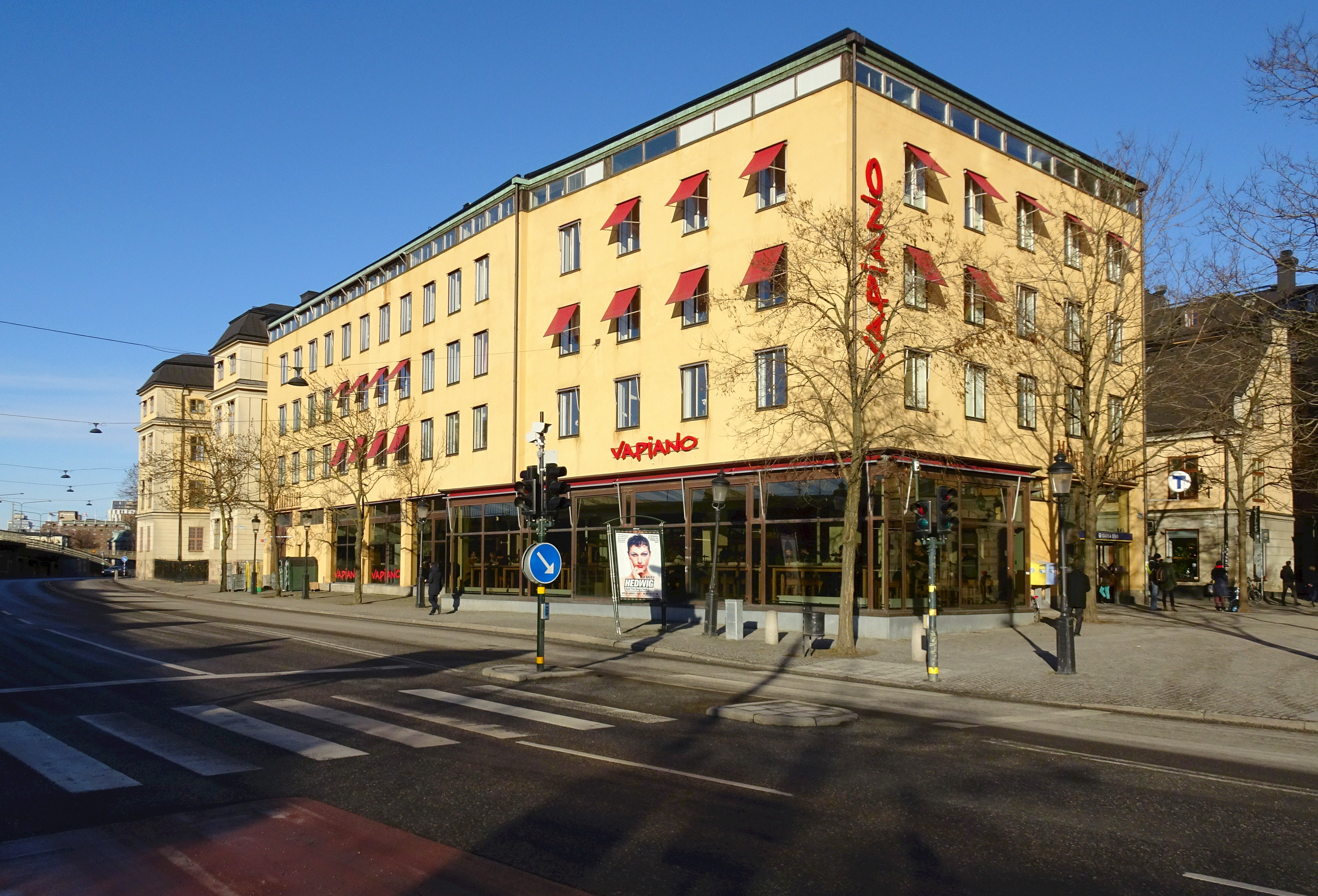 Kvarteret Icarus, Munkbrohallen, Munkbroleden